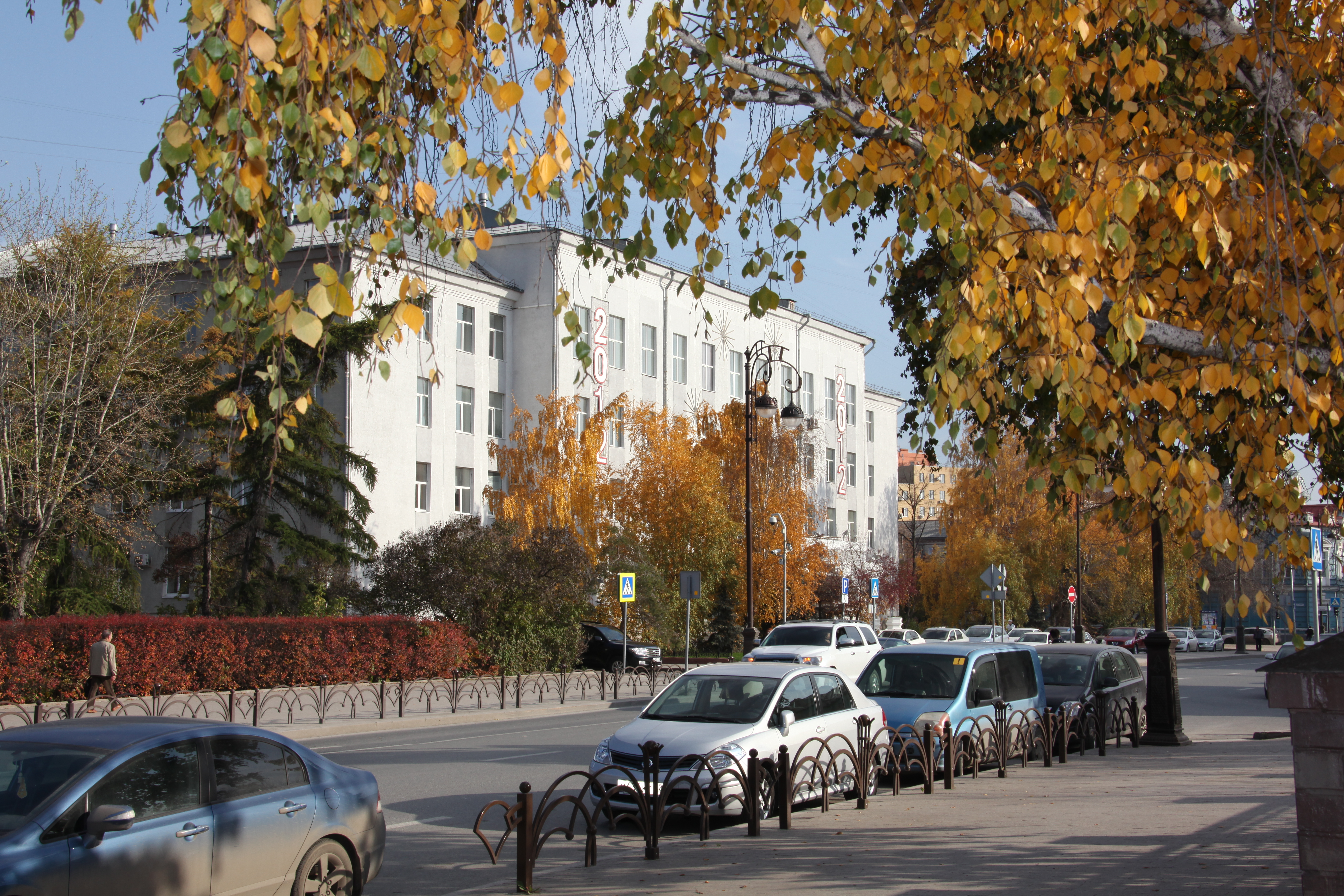 La ĉefsidejo de la Tjumena Ŝtata Universitato. Tjumeno, Rusio.